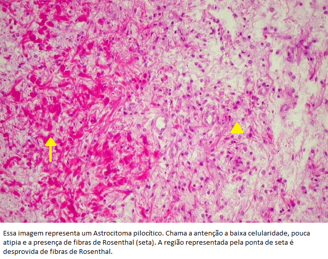 Essa imagem representa um Astrocitoma pilocítico. Chama a antenção a baixa celularidade, pouca atipia e a presença de fibras de Rosenthal (seta). A região representada pela ponta de seta é desprovida de fibras de Rosenthal.